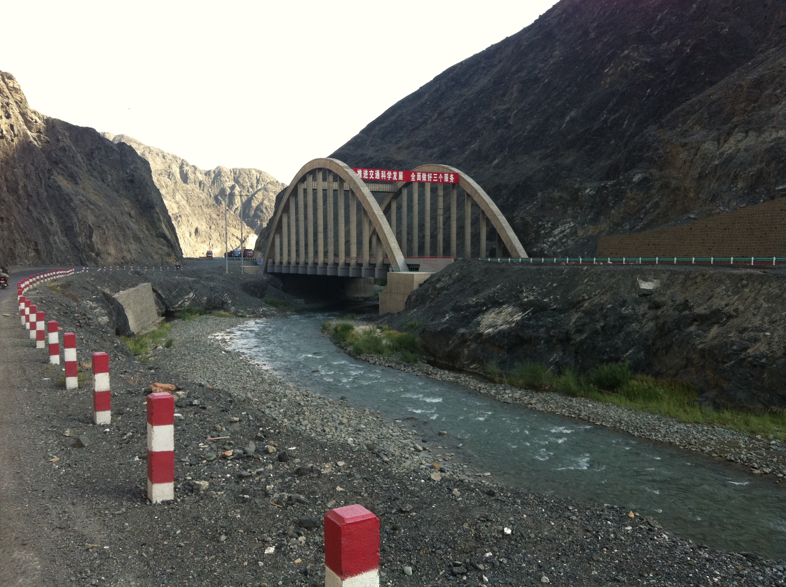 Highway G312 Xinjiang, China